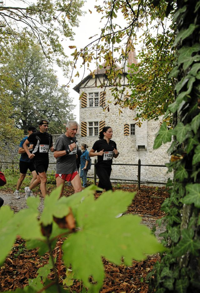 Hallwilerseelauf 2006, Schloss Hallwyl